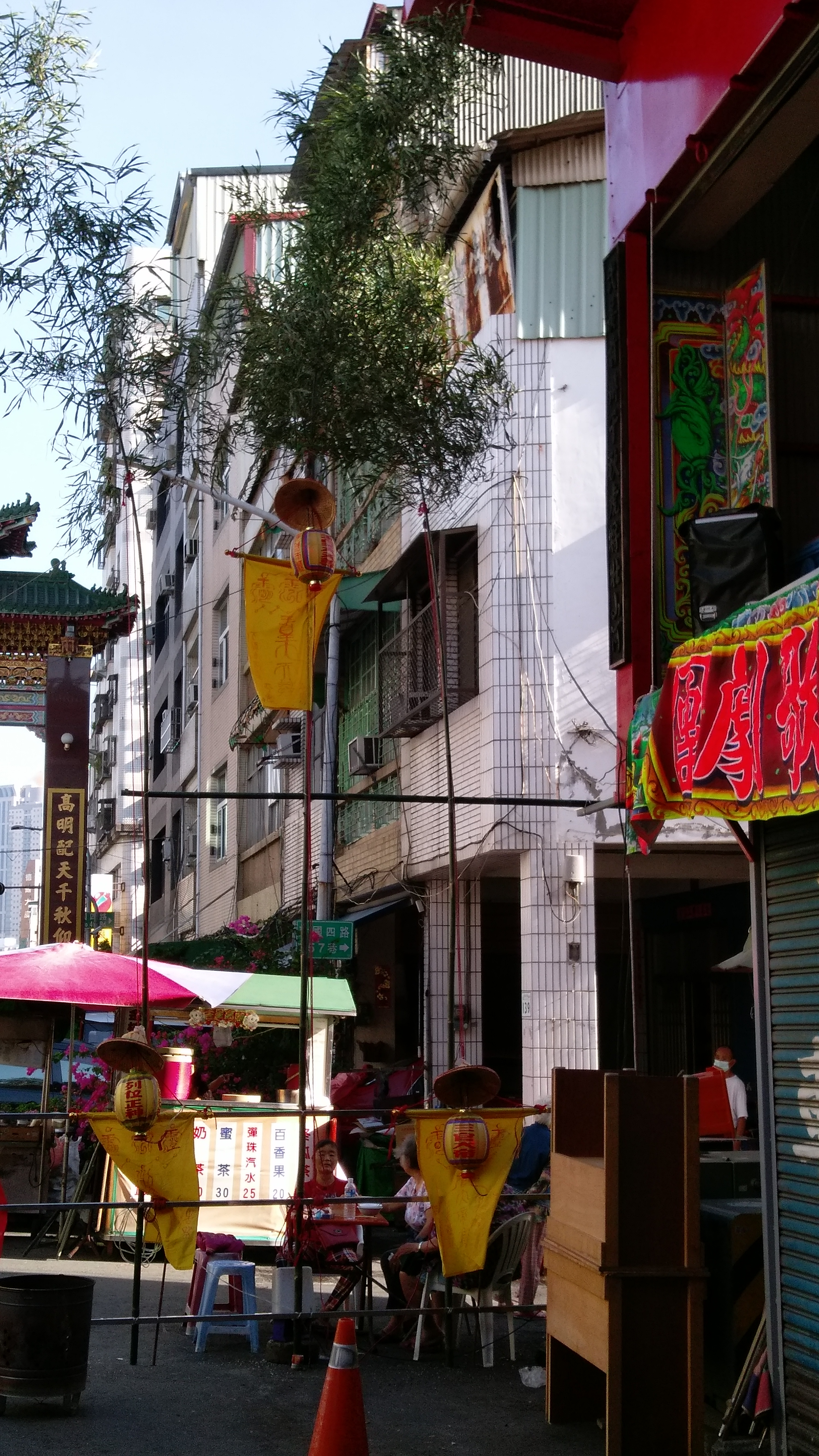 中文（台灣）: 高雄鹽埕埔文武聖殿於下元節舉行祈安清醮所束的燈篙